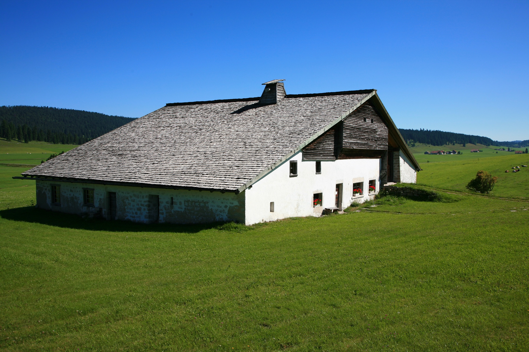 Le Grand Cachot